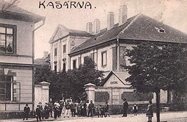 Die Dragoner Kaserne in Brandeis-Atlbunzlau /Elbe um 1900